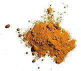 photo curcuma